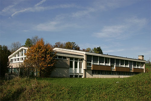 Schulhaus in Bretzwil